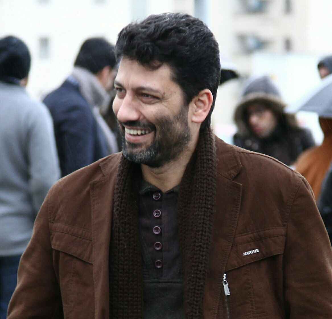 نویسنده ایرانی